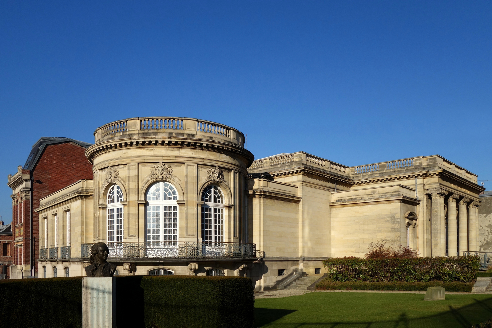 Musée